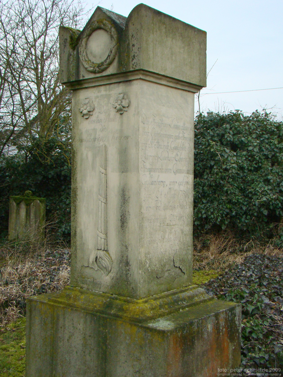 Grabmal für Freifrau Luise Auguste von Gemmingen-Guttenberg geb. von St. André (1756-1815) auf dem Friedhof in Bad Rappenau-Bonfeld